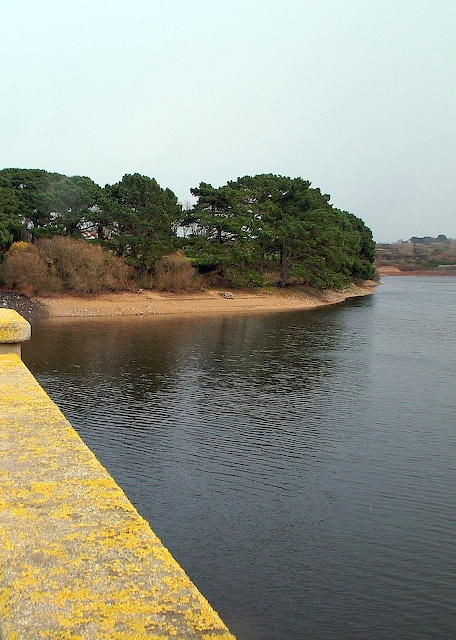 Le réservoir à Saint-Sauveur (Guernesey) alimentant toute l’île en eau potable